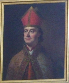 Peder Jensen Lodehat (død 1416, biskop over Roskilde 1395-1416).